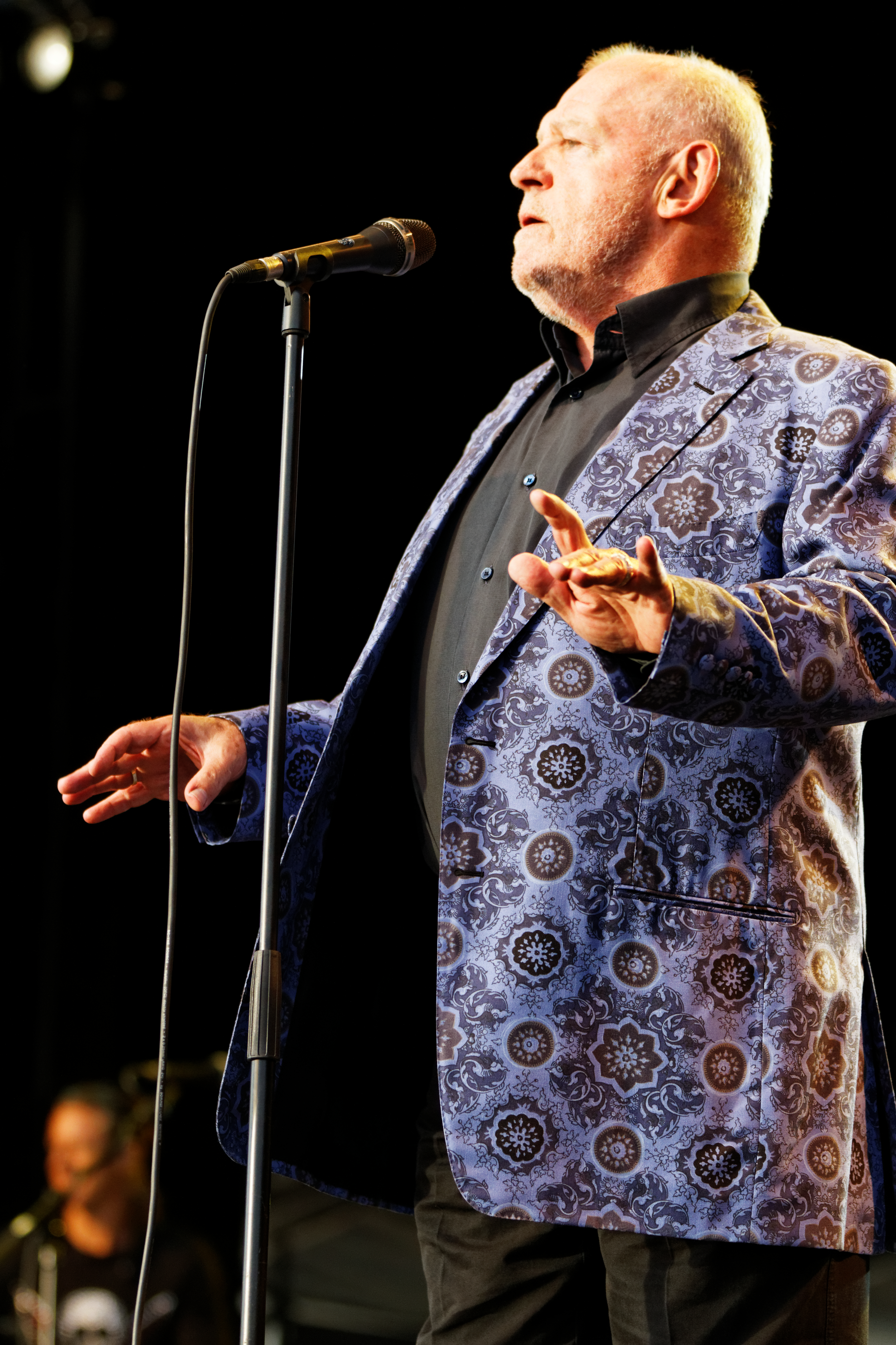 Joe Cocker en concert sur la scène Landaoudec lors du festival du bout du Monde à Crozon dans le Finistère (France).